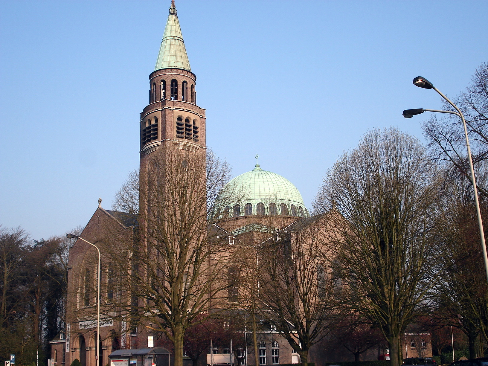 Edegem bij Antwerpen, Onze-Lieve-Vrouw-van-Lourdesbasiliek.